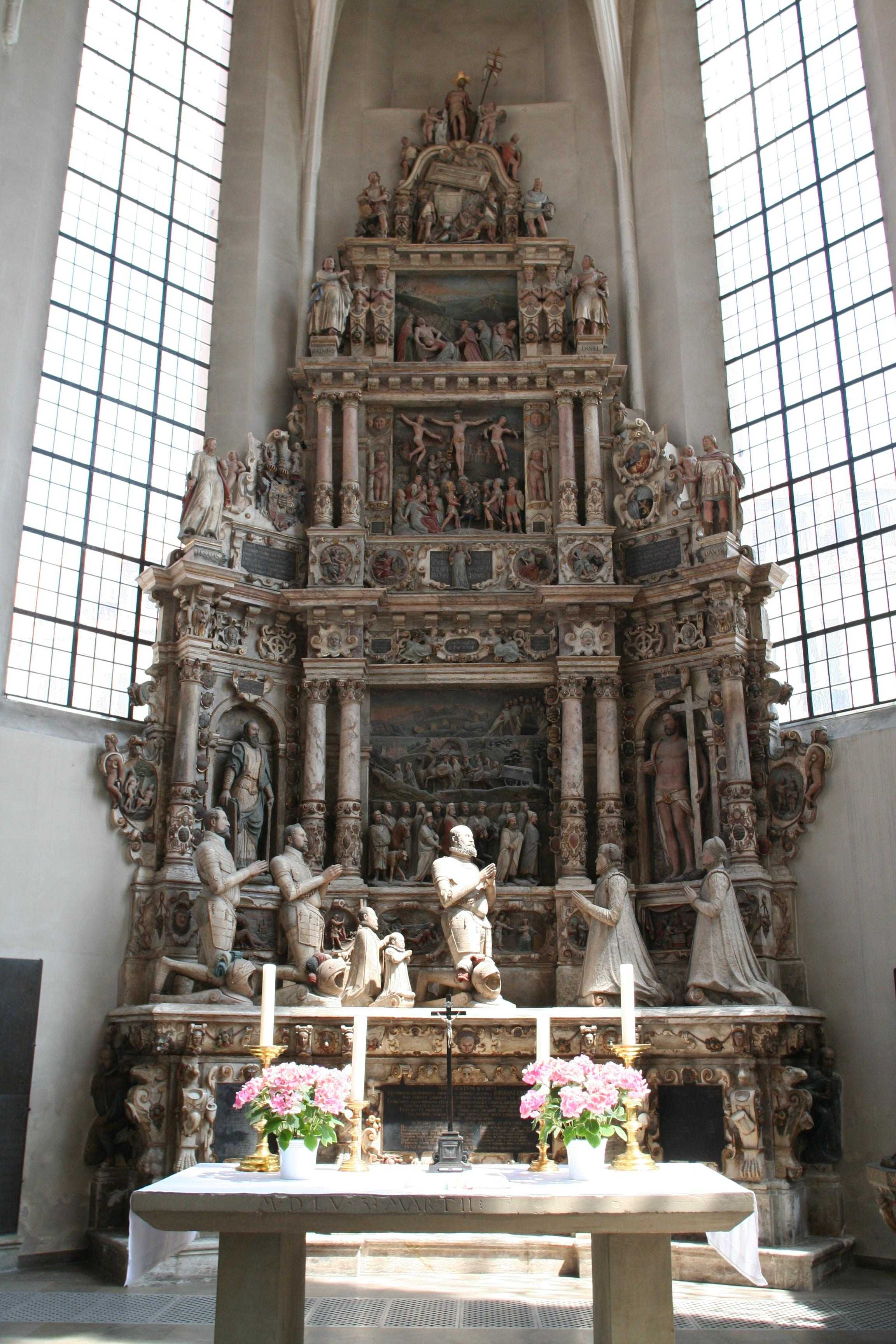 Morizkirche, Kirchhof 1 Coburg Epitaph in der Morizkirche in Coburg